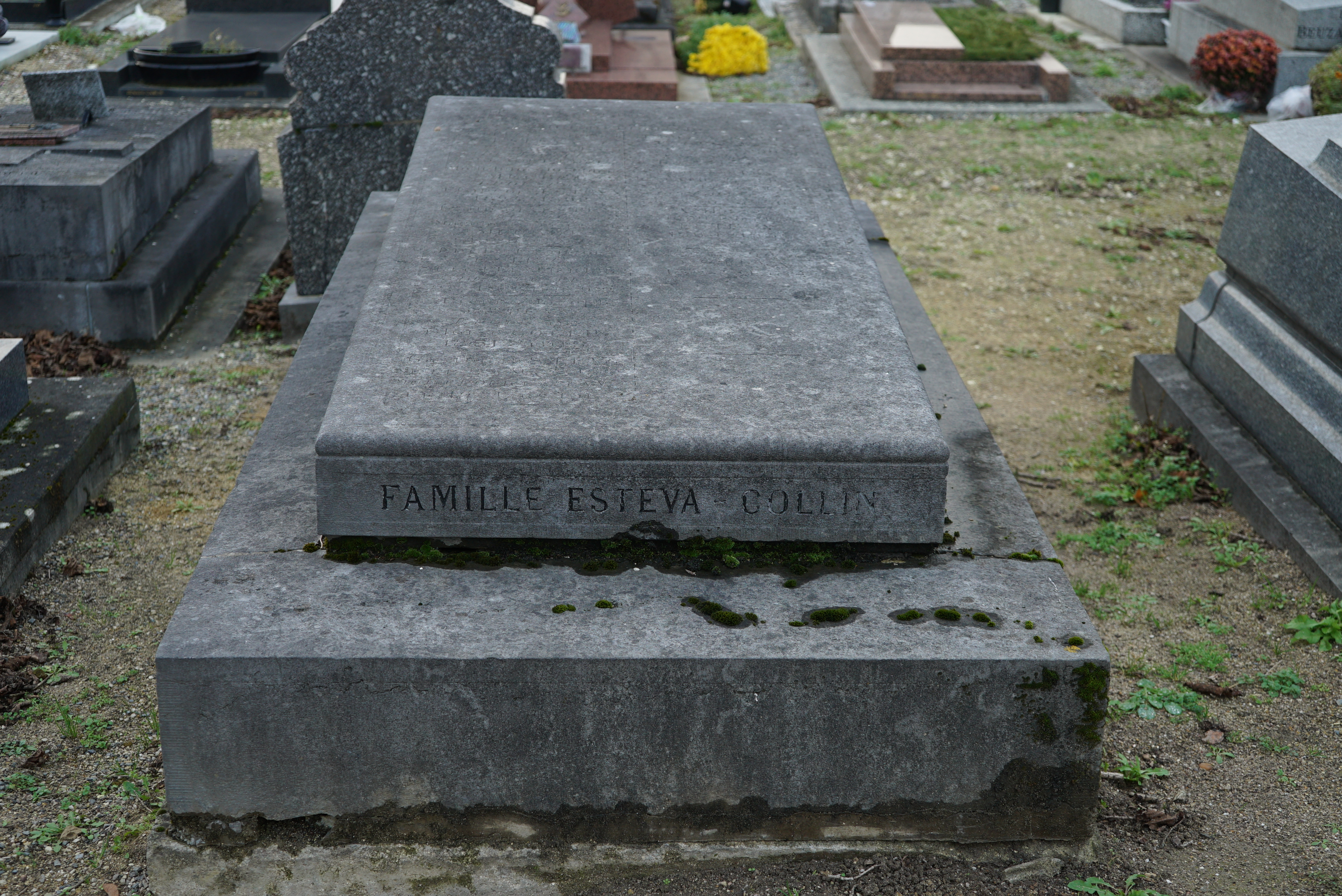 sepulture de l'amiral jean-Pierre esteva, canton 10-2 concession 10.